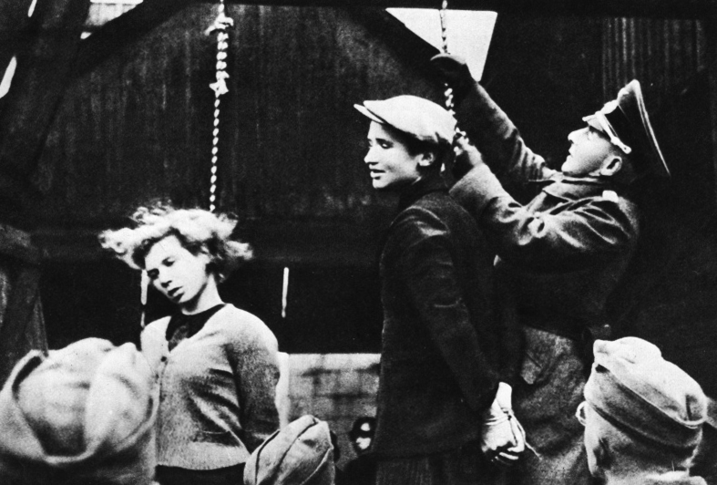 Résistante russe juive, pendue par les allemands le 26 octobre 1941. Photographie prise par un photographe lithuanien collaborateur des Nazis. Non identifié à ce jour.